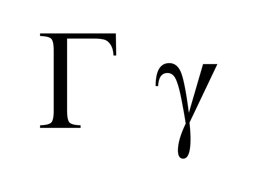 greek letter gamma